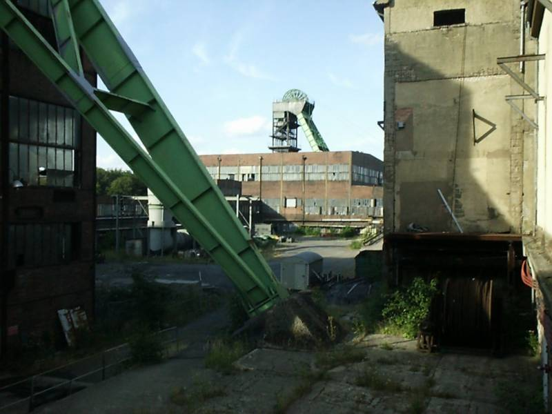 Die beiden Fördertürme von Landsweiler-Reden (Saar) auf einem langsam renaturisierenden Firmengelände aufgenommen am 31.07.2006 gegen 19:00 Uhr